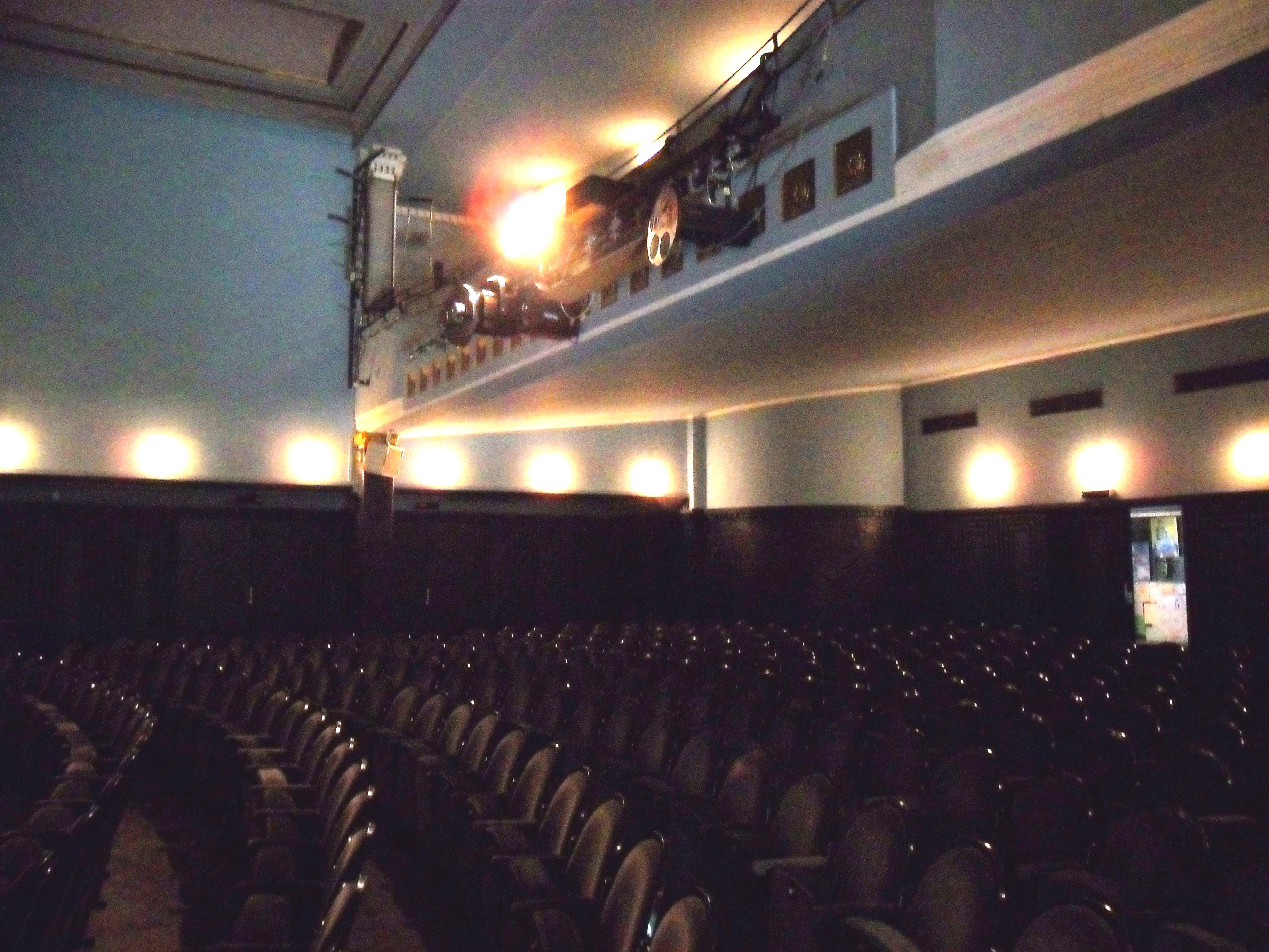 Münchner Theater für Kinder Zuschauerraum